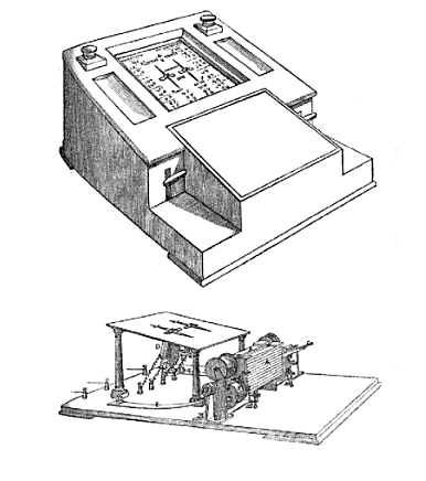 Telegrafo Henley adottato nel Regno delle Due Sicilie (1858).